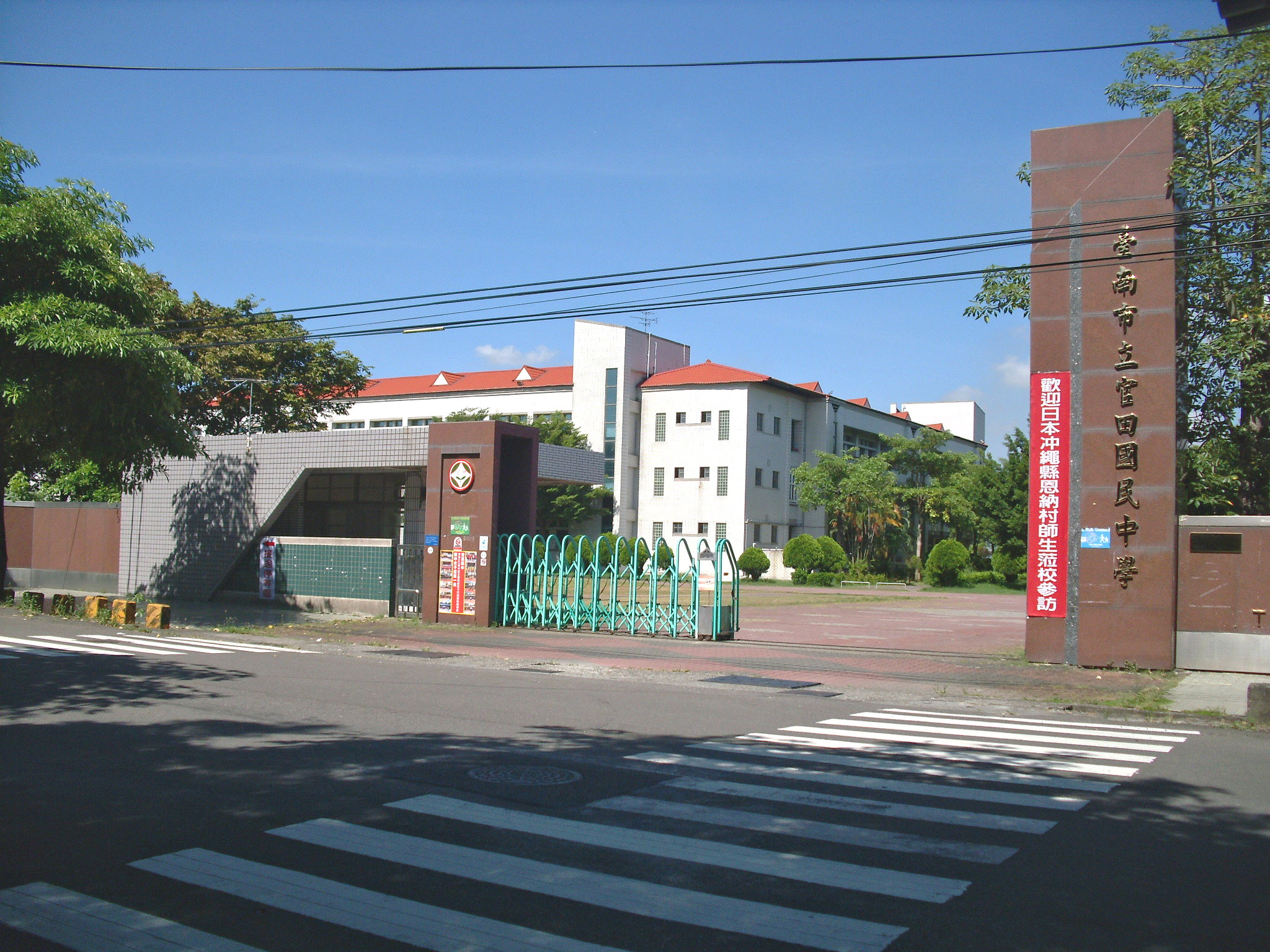 Bân-lâm-gú: 臺南市立官田國民中學